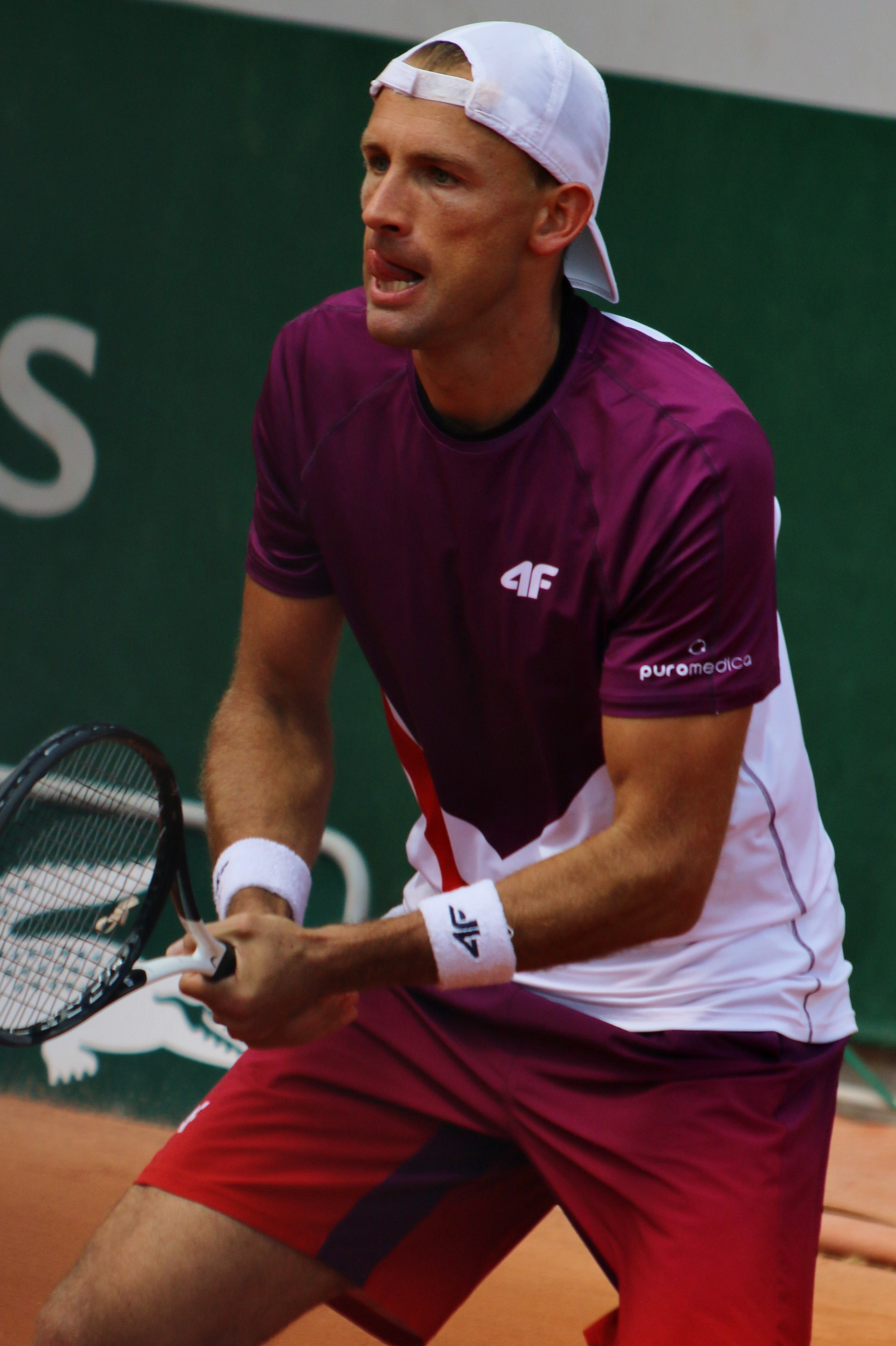 Kubot RG19 (1)